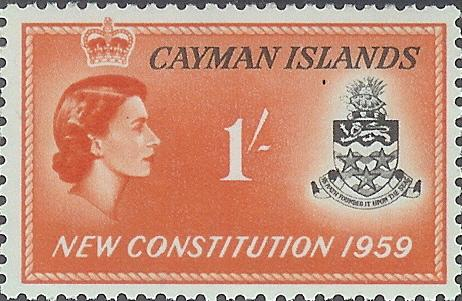 Timbre 156 Cayman.